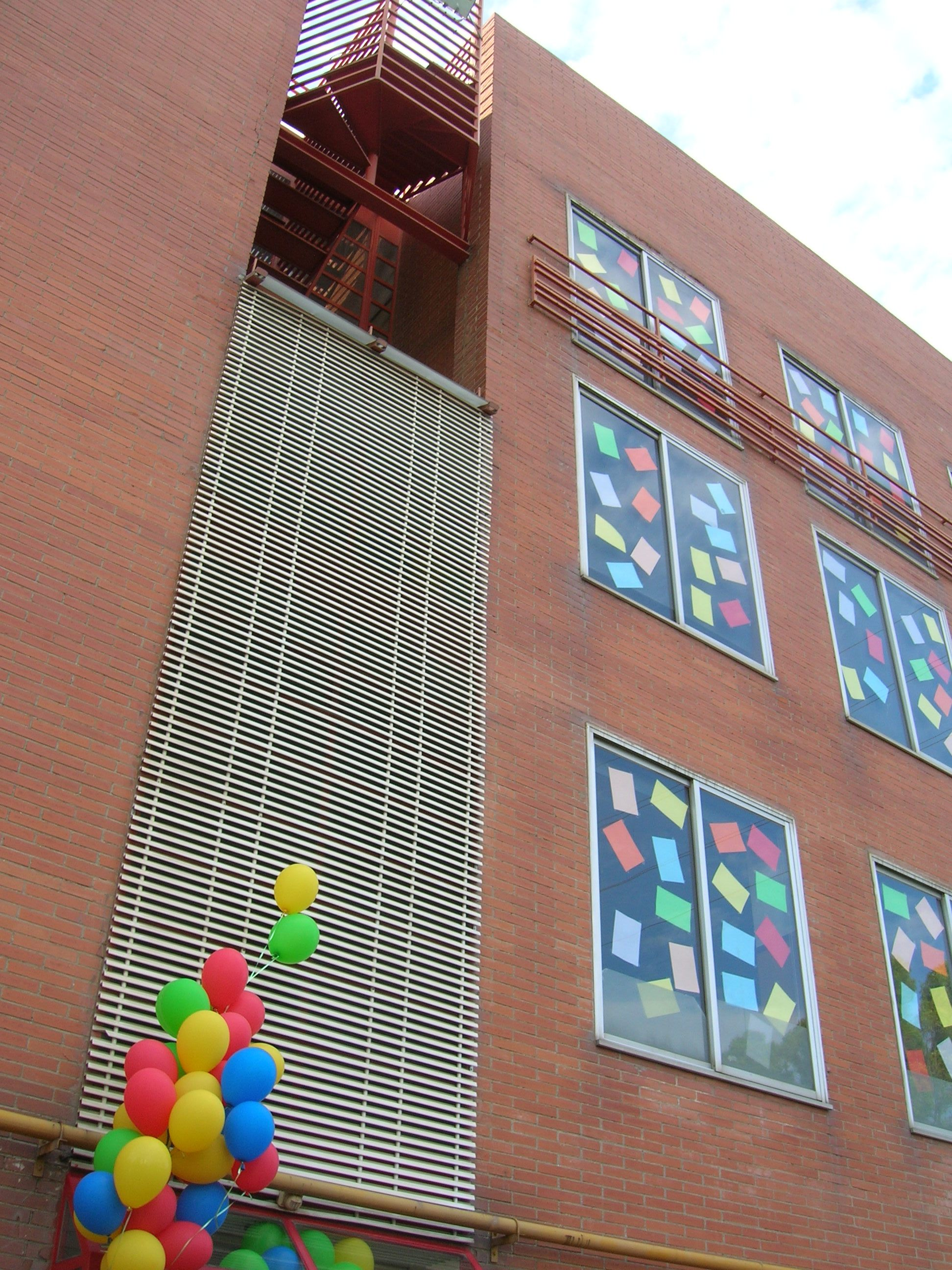 Façana_001